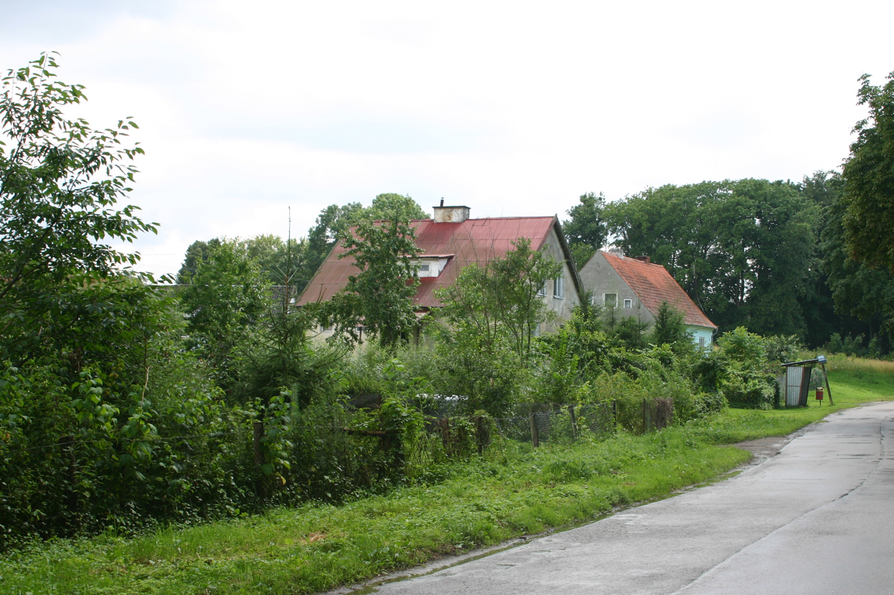 Markuzy, Polska, powiat kętrzyński.